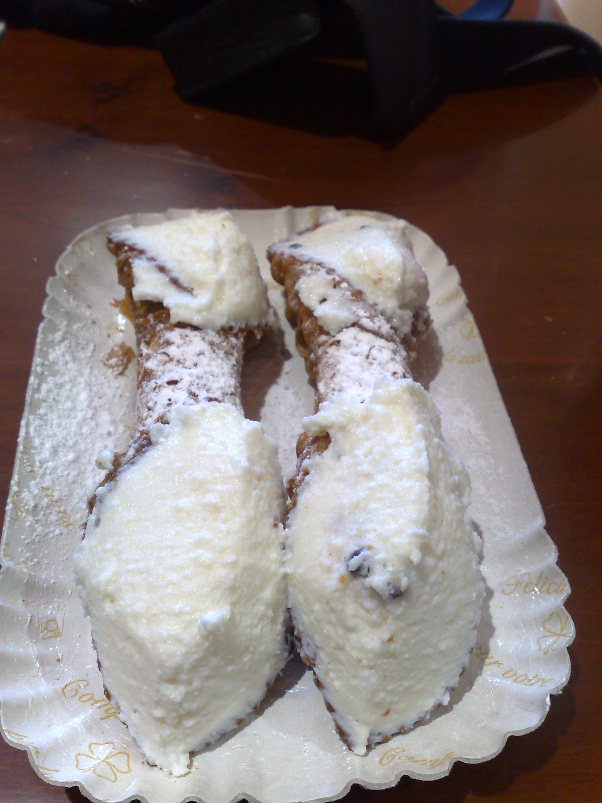 Cannoli di Dattilo (Trapani)